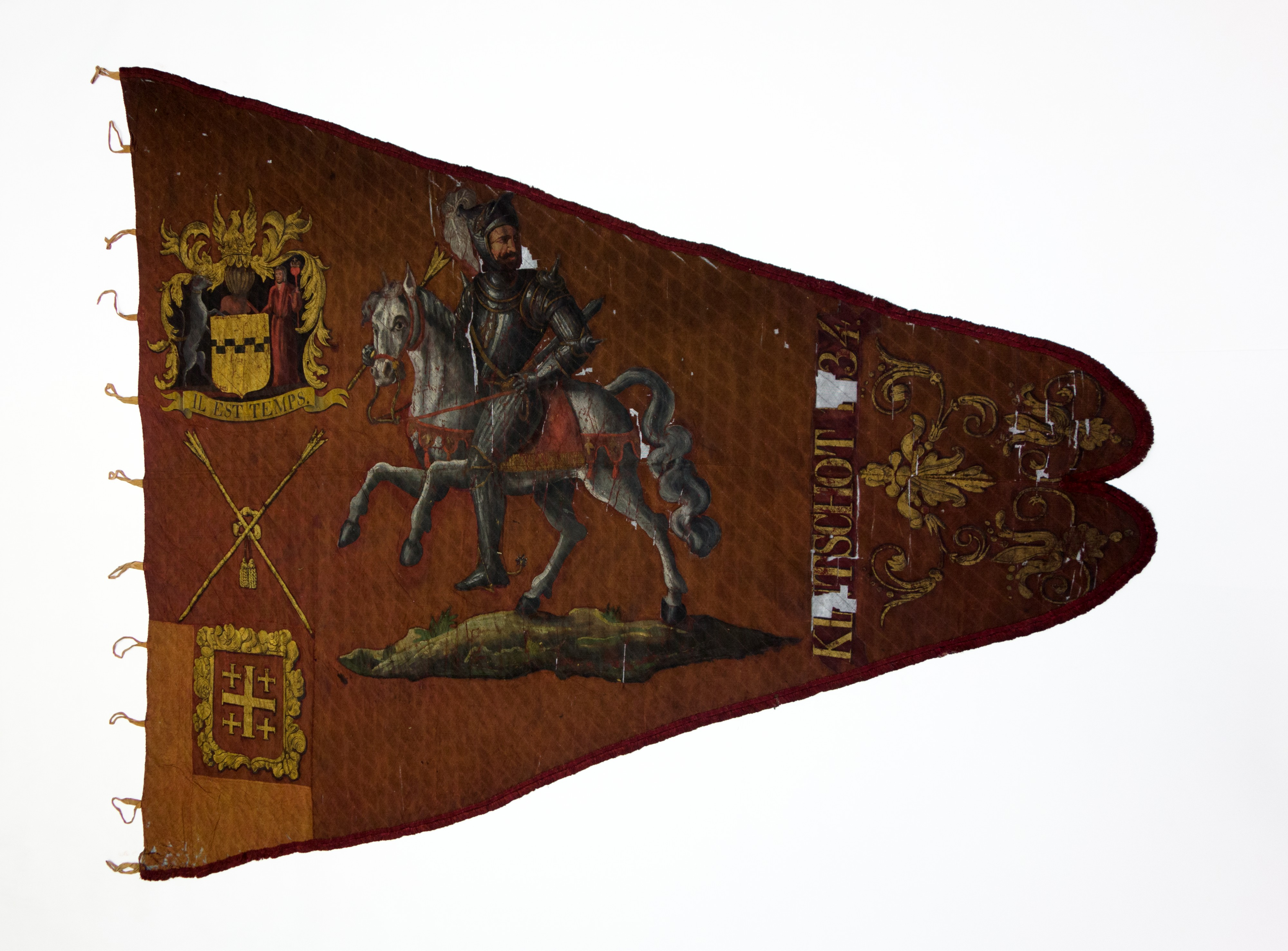 French; Banner with shaft; Banners